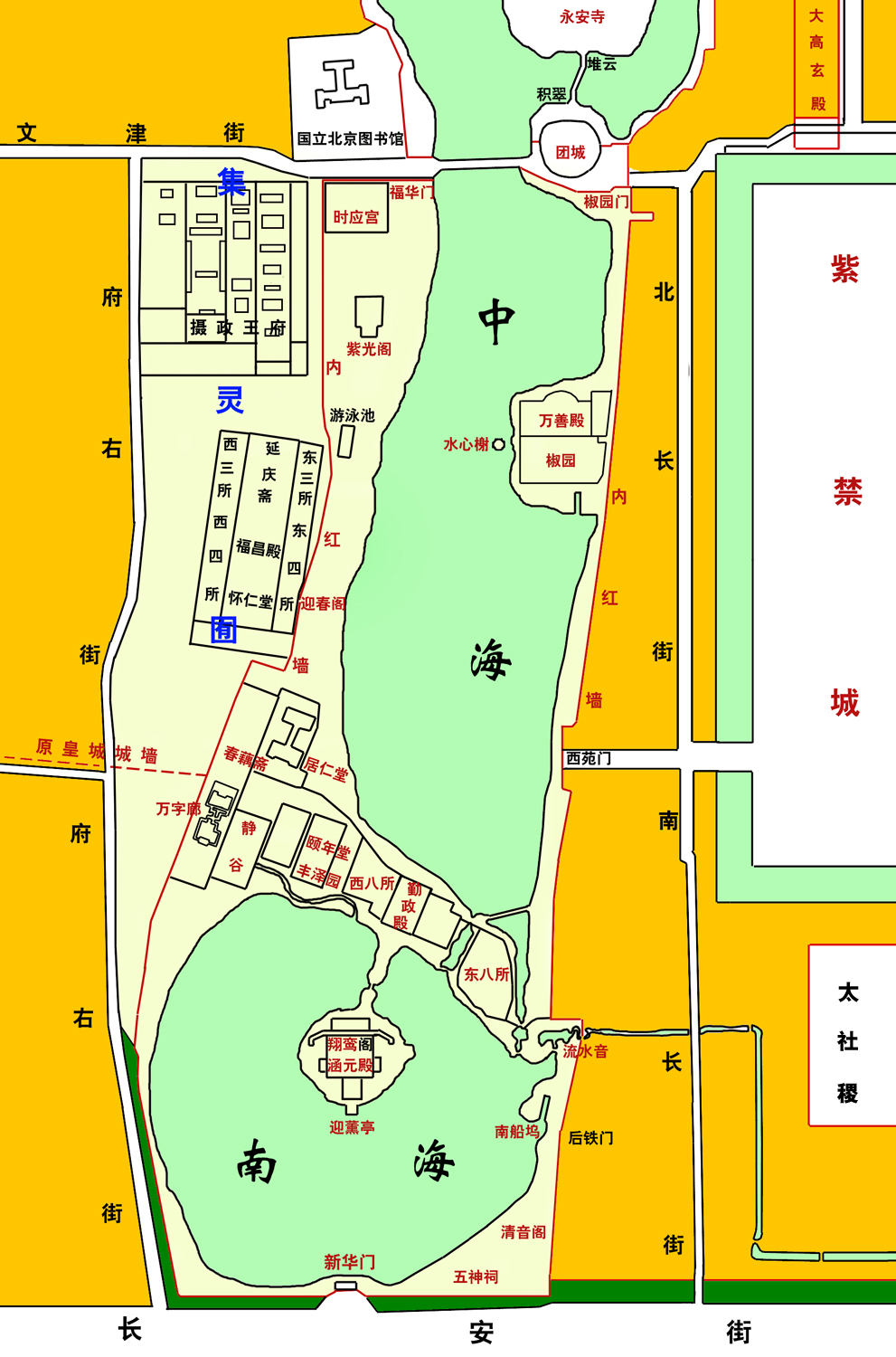 map of Zhongnanhai, Beijing